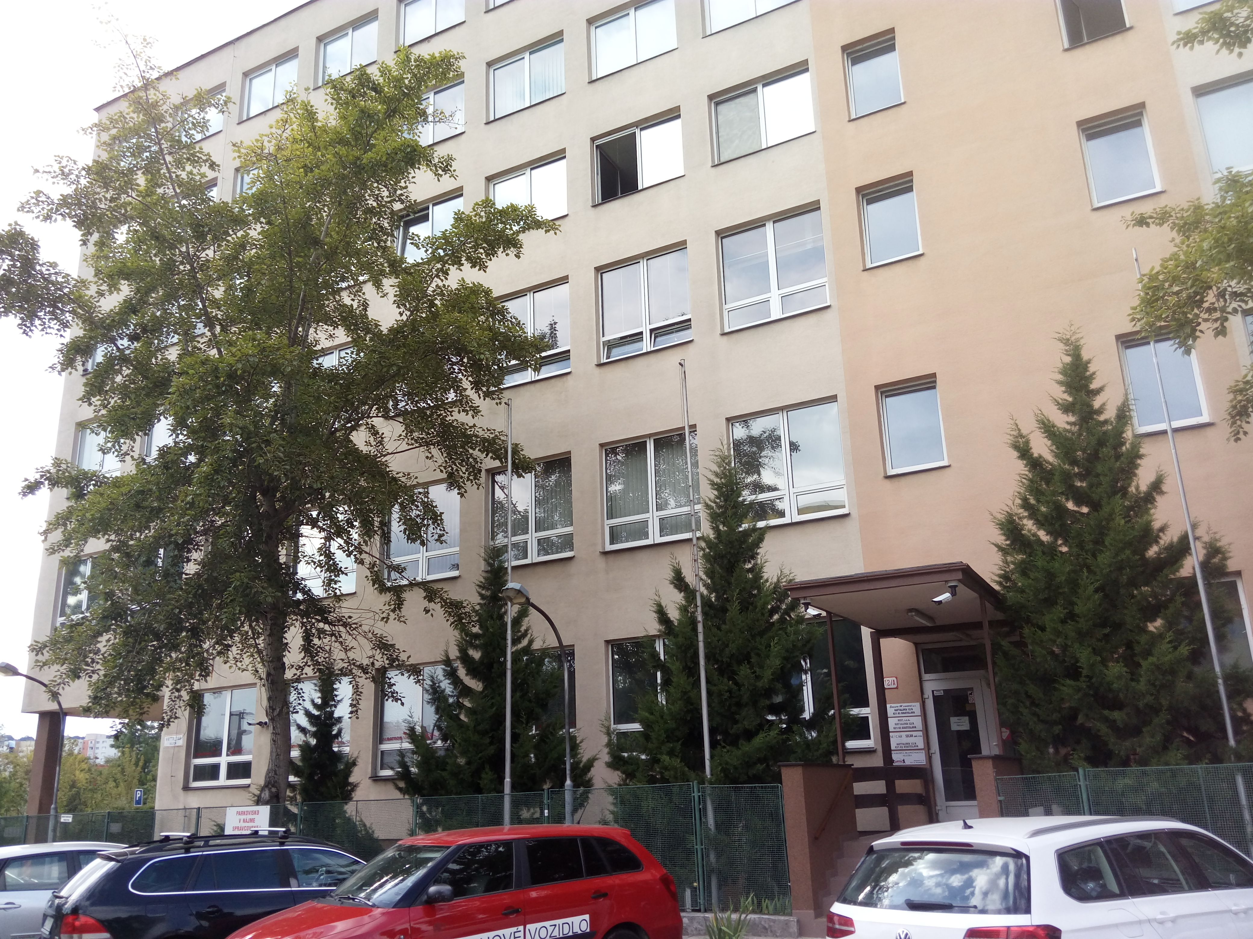 Hattalova 12/A, Nové Mesto, Bratislava